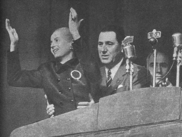 Eva Duarte (Evita). Perón sostiene a Eva mientras pronuncia un discurso en Plaza de Mayo el 1 de Mayo de 1952. A la derecha el secretario de Información Raúl Apold.